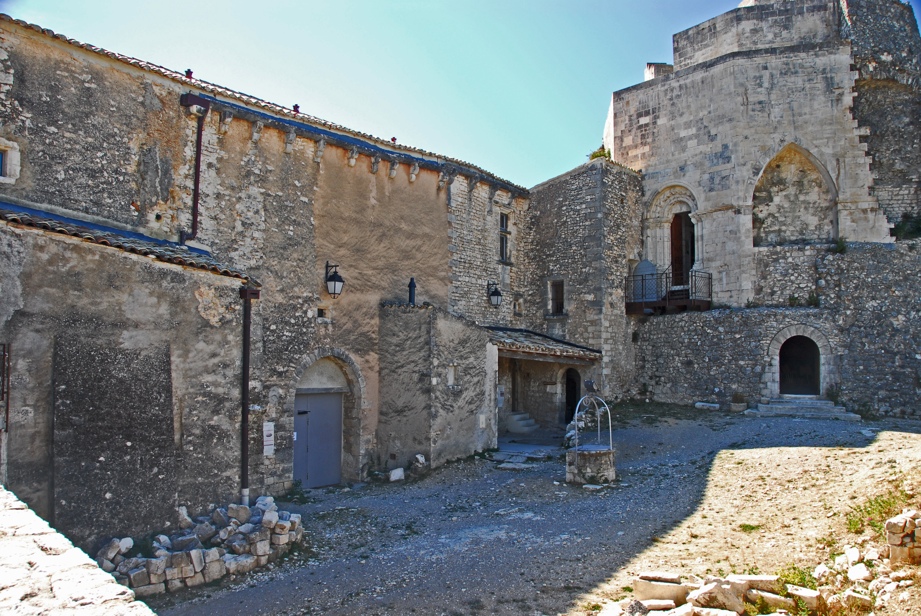 Chateau de Simiane-la-Rotonde, Wohngebäude u. Donjon von NO